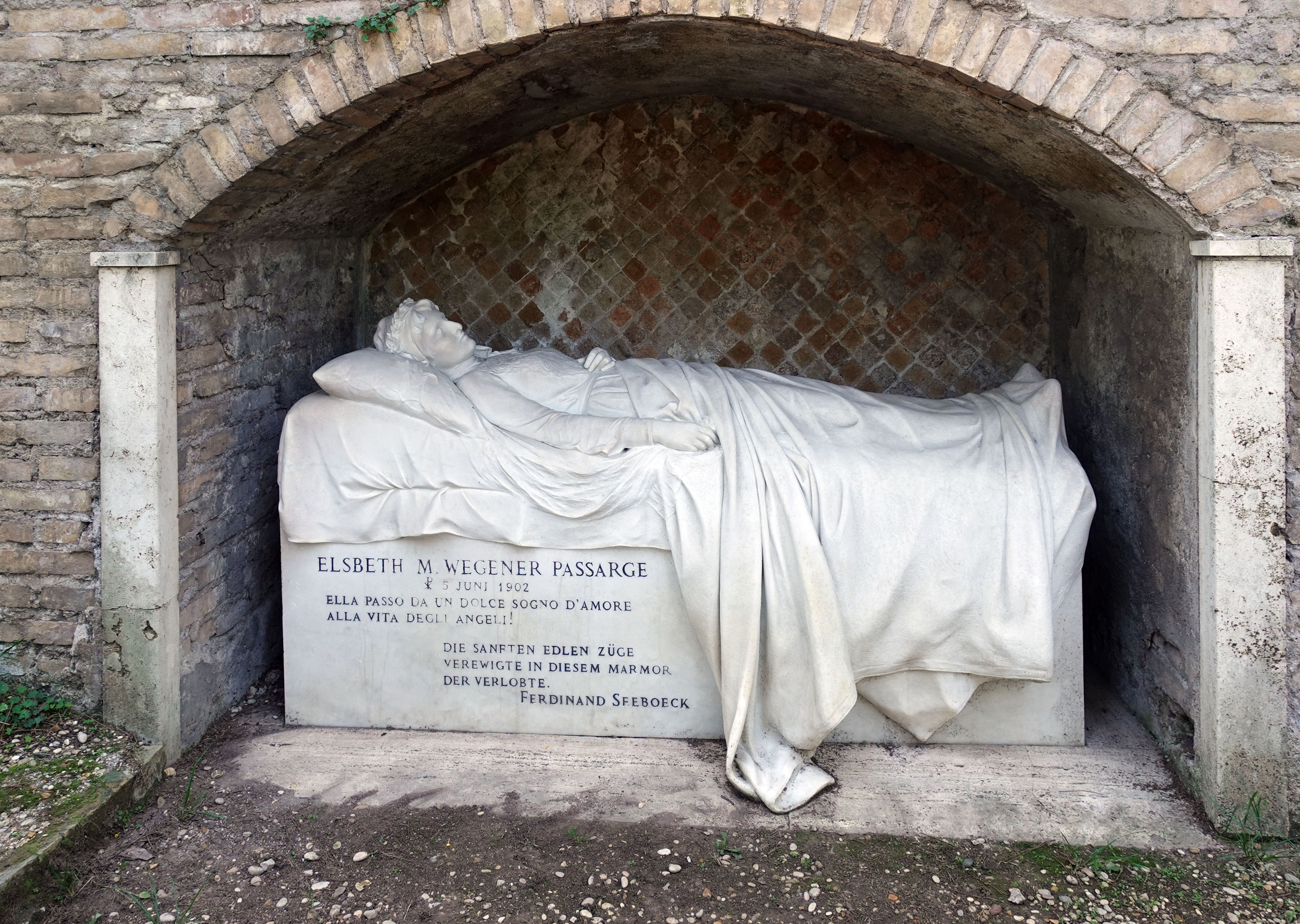 Ferdinand Seeboeck: Grabmahl von Elisabeth Wegener-Passarge (1884–1902) auf dem Cimitero Acattolico per Stranieri in Rom.